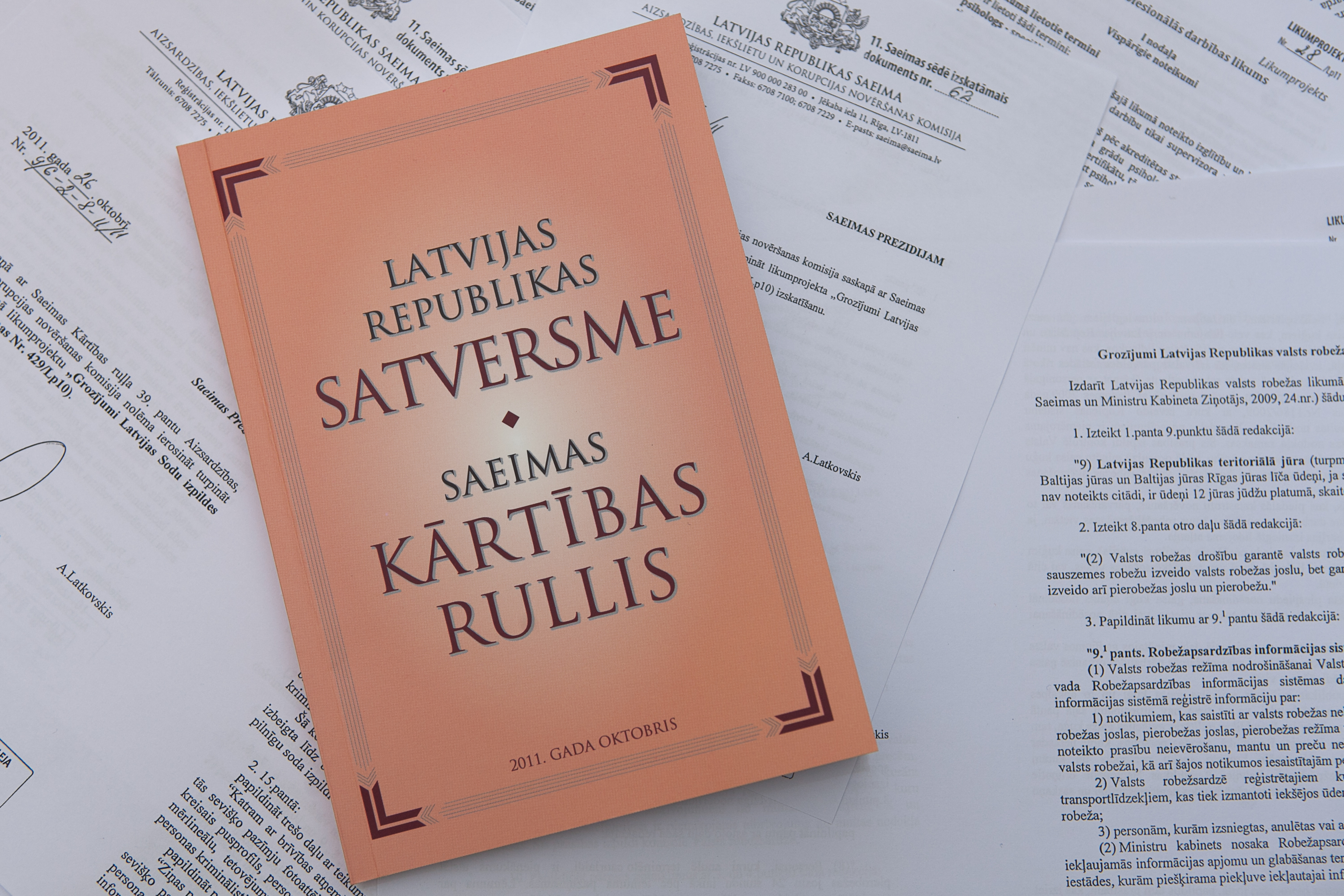 Foto: Ernests Dinka, Saeimas Kanceleja.